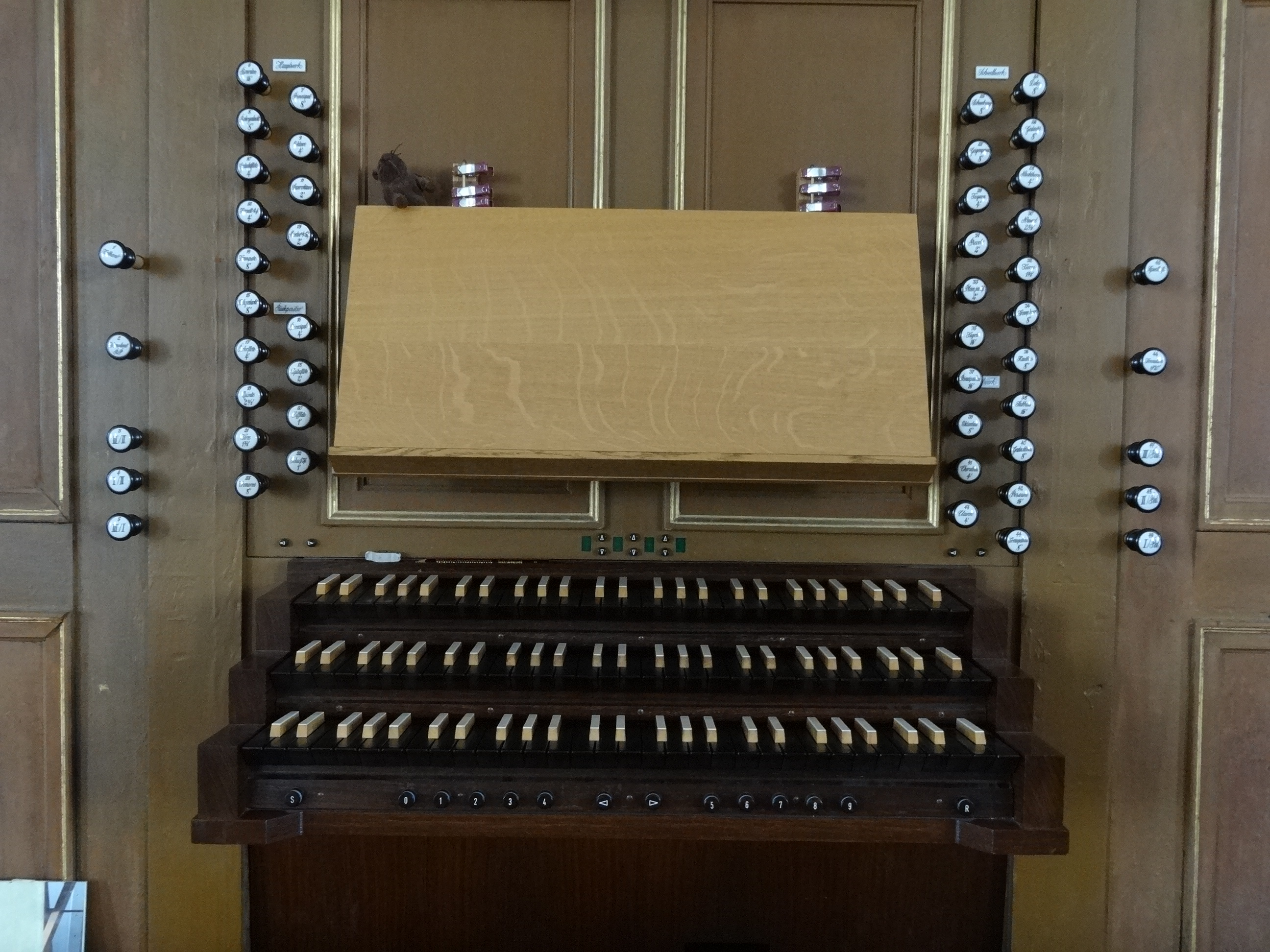 Marienstiftskirche Lich